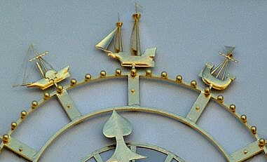 Nordstjernanhusets byggnadsur, detalj av fartyg